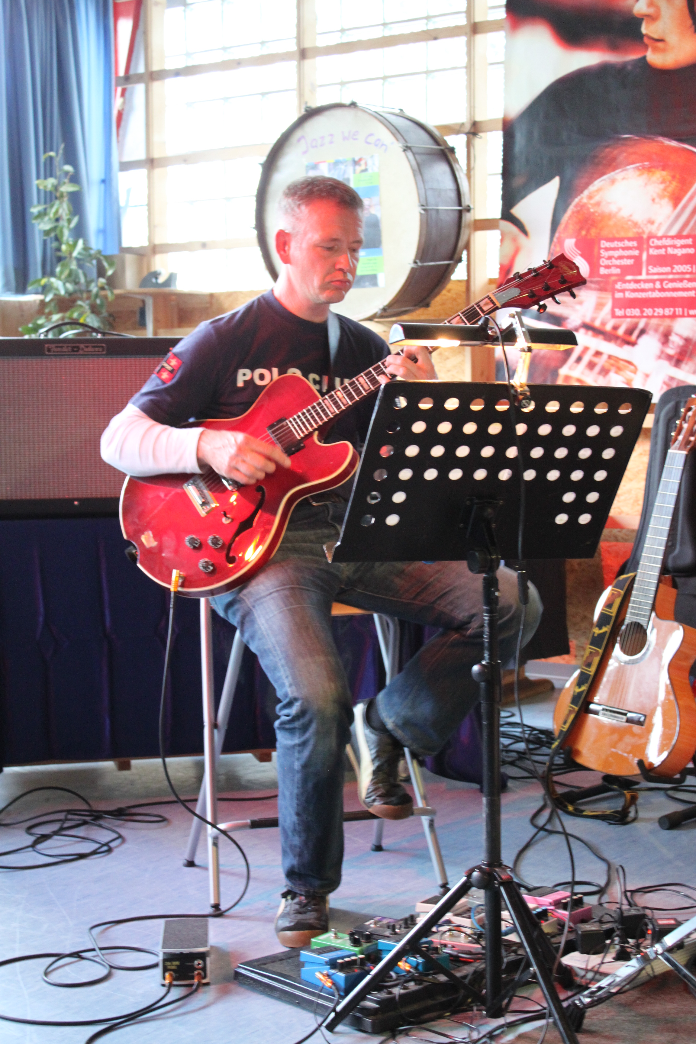 Der Gitarrist Thomas Andelfinger bei einem Konzert mit Tiologic in Bad Marienberg (Westerwald) 2011